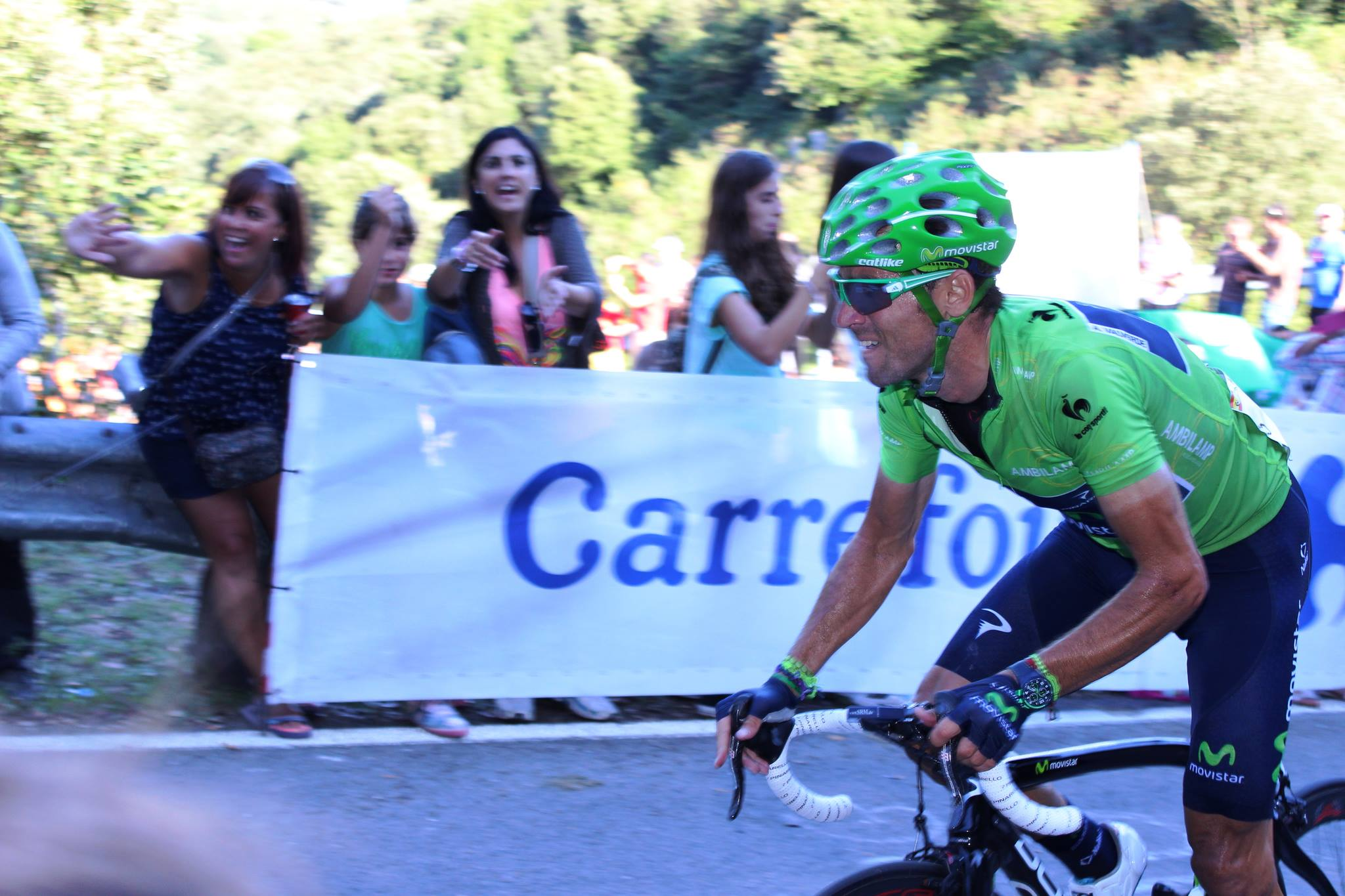 El ciclista murciano, Alejandro Valverde, en plena ascensión durante la 18ª etapa de la Vuelta a España con final en Peña Cabarga